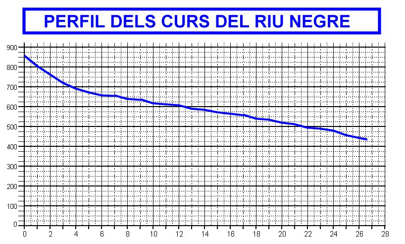 Perfil del curs del riu Negre (Solsonès)